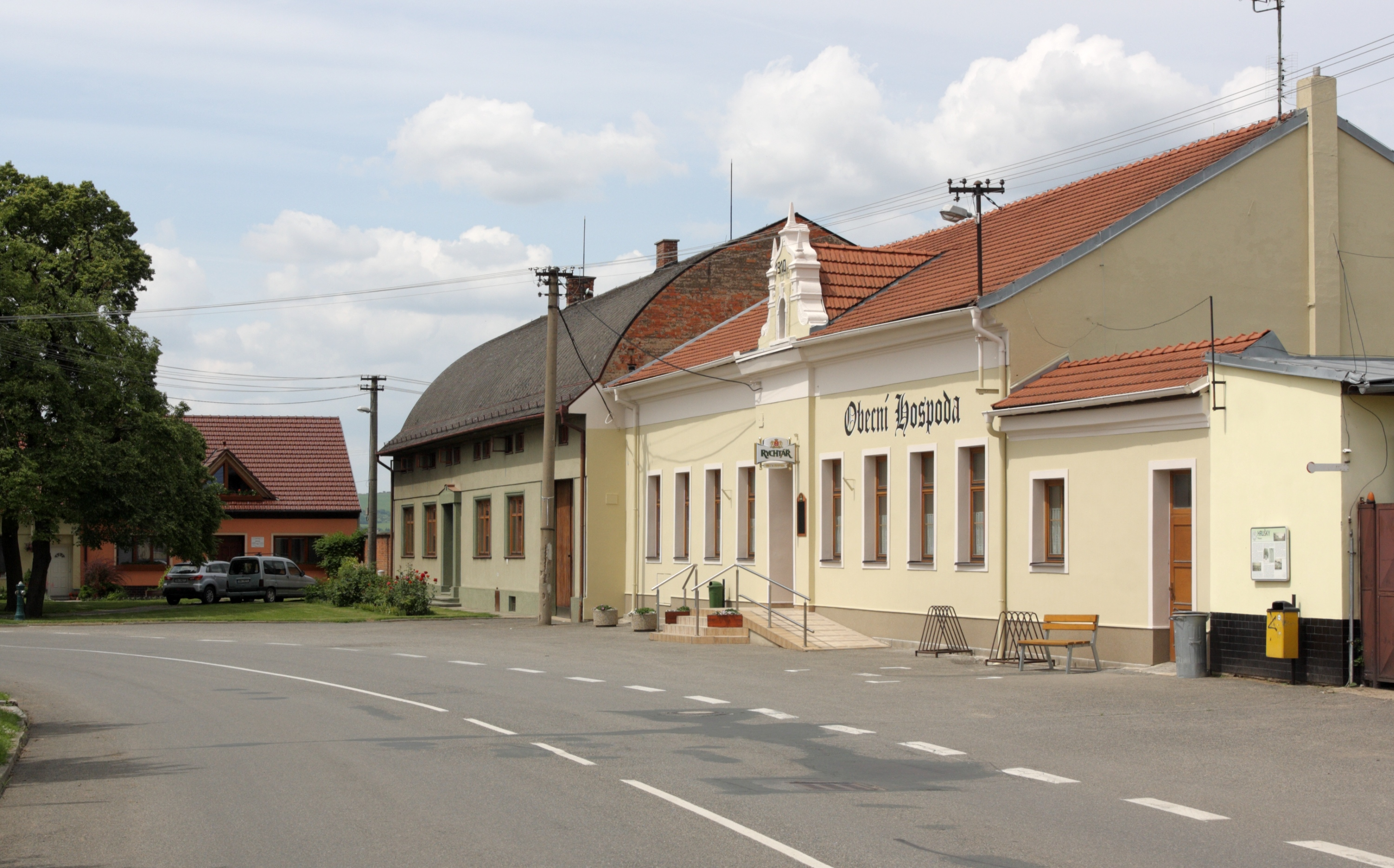 Hrušky (okres Vyškov) - obecní hospoda.